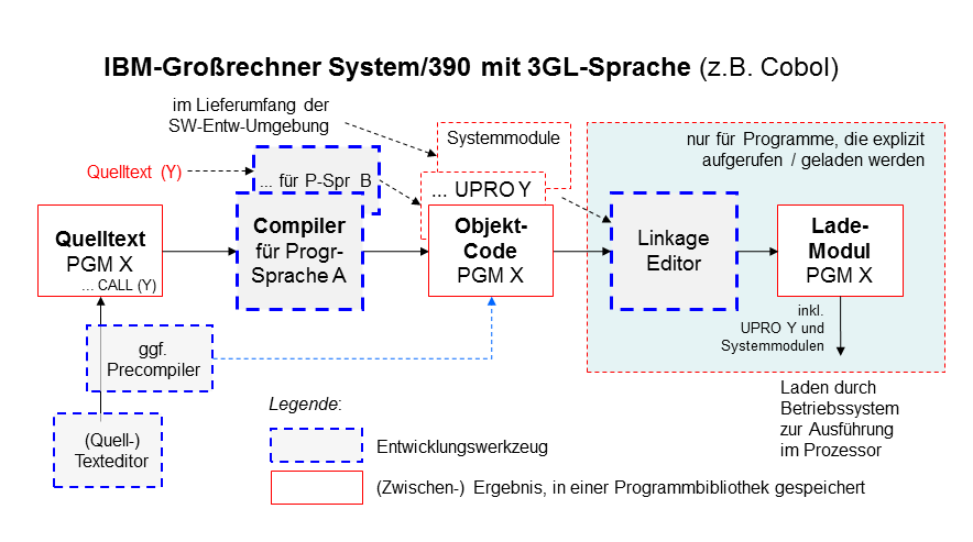 Ablauf der Kompilierung am Beispiel IBM-Großrechner